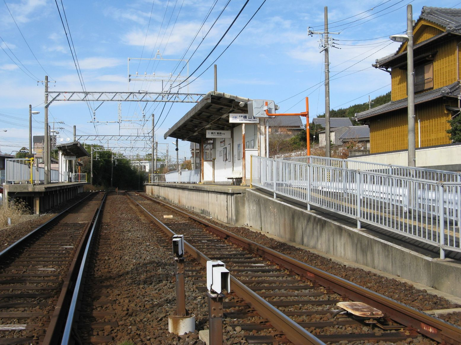 Shima-Yokoyama Station, Shima, Mie, Japan